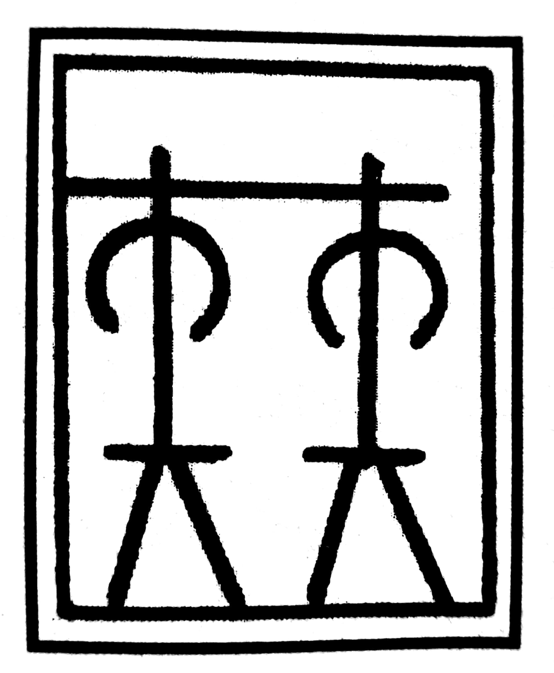 සිංහල: cave paintings ශ්‍රී ලංකාවේ පිහිටි තන්තිරිමලේ ඓතිහාසික ගුහා සිතුවමක්. නම - කණ්ඩායම් සම්පිණ්ඩනය